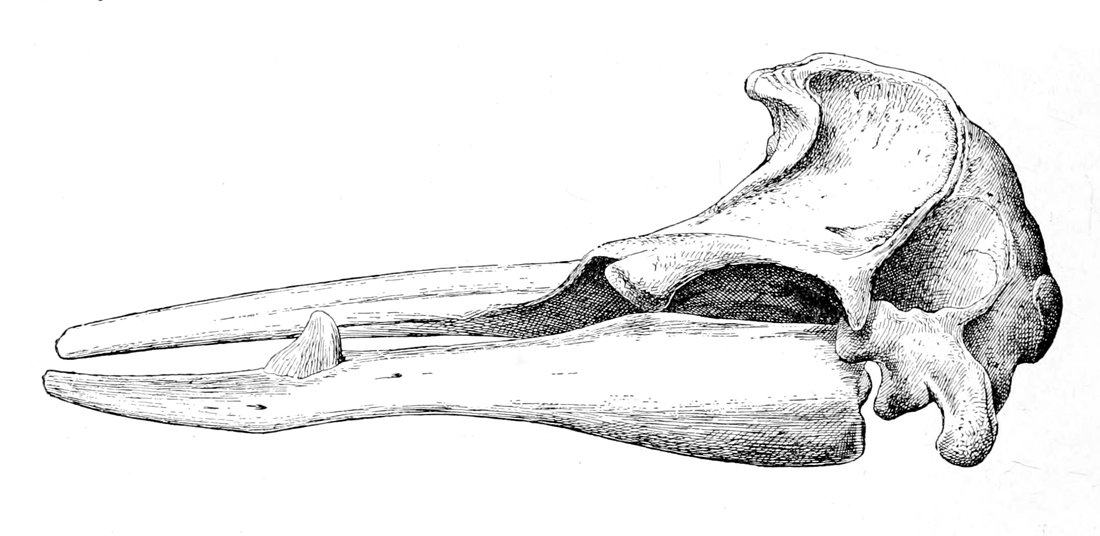 Mesoplodon bidens